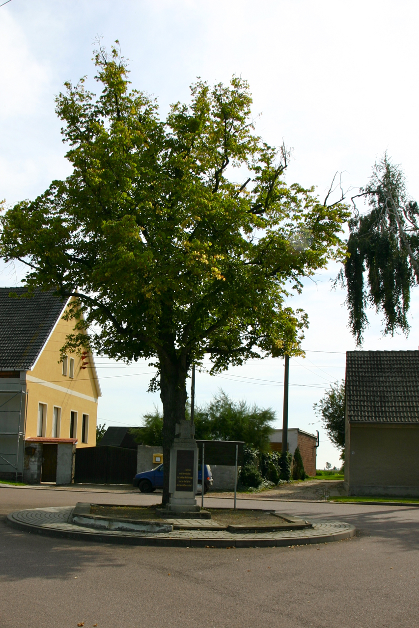 Würflau ist ein Teil der Gemeinde Osternienburger Land in Sachsen-Anhalt.